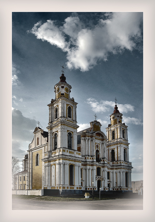 Беларуская (тарашкевіца): Комплекс былога кляштара бэрнардынцаў, дэкаратыўнае аздабленьне касьцёла: галоўны і бакавыя алтары росьпісы. в. Будслаў This is a photo of Belarusian heritage monument. Reference number: 611Г000422 ( WLM)